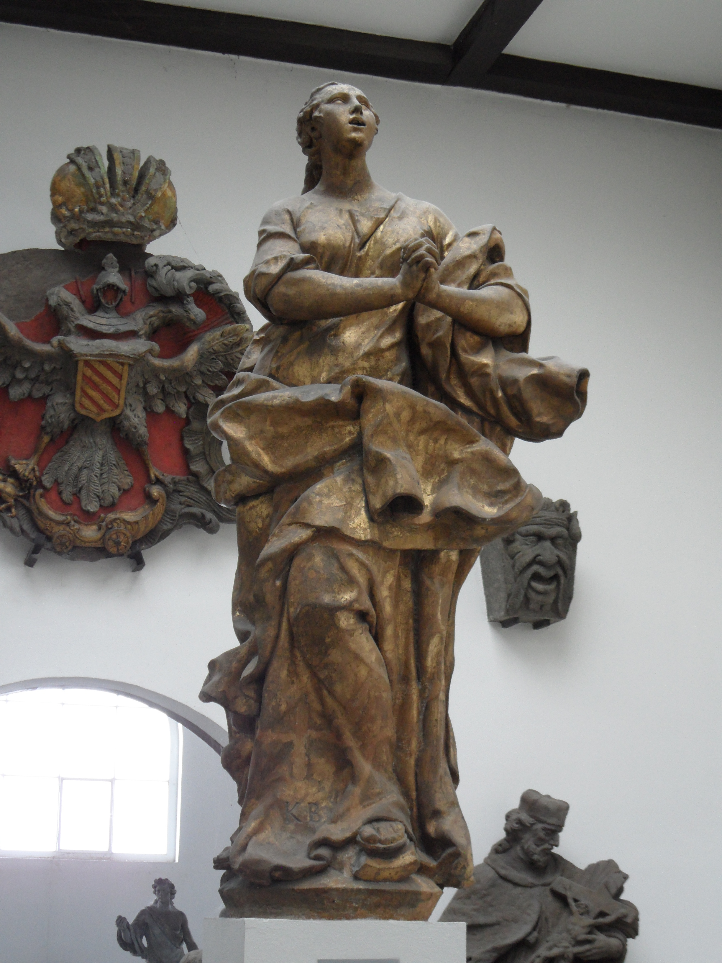 Socha Immaculaty z Mariánského sloupu na Hradčanech, Praha - Ferdinand Maxmilián Brokoff